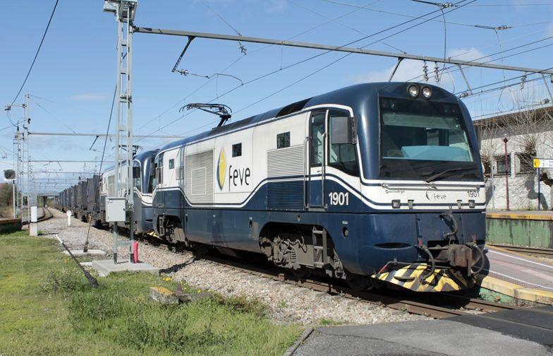 Tren de mercancías de FEVE ha su paso por la estación asturiana de El Berrón